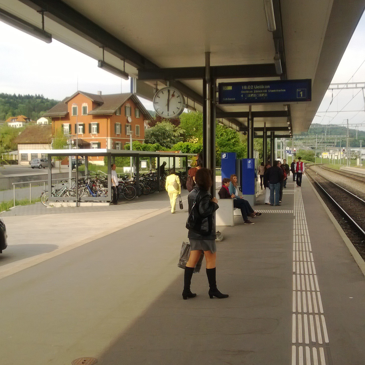 Bahnhof Otelfingen/ Aargau